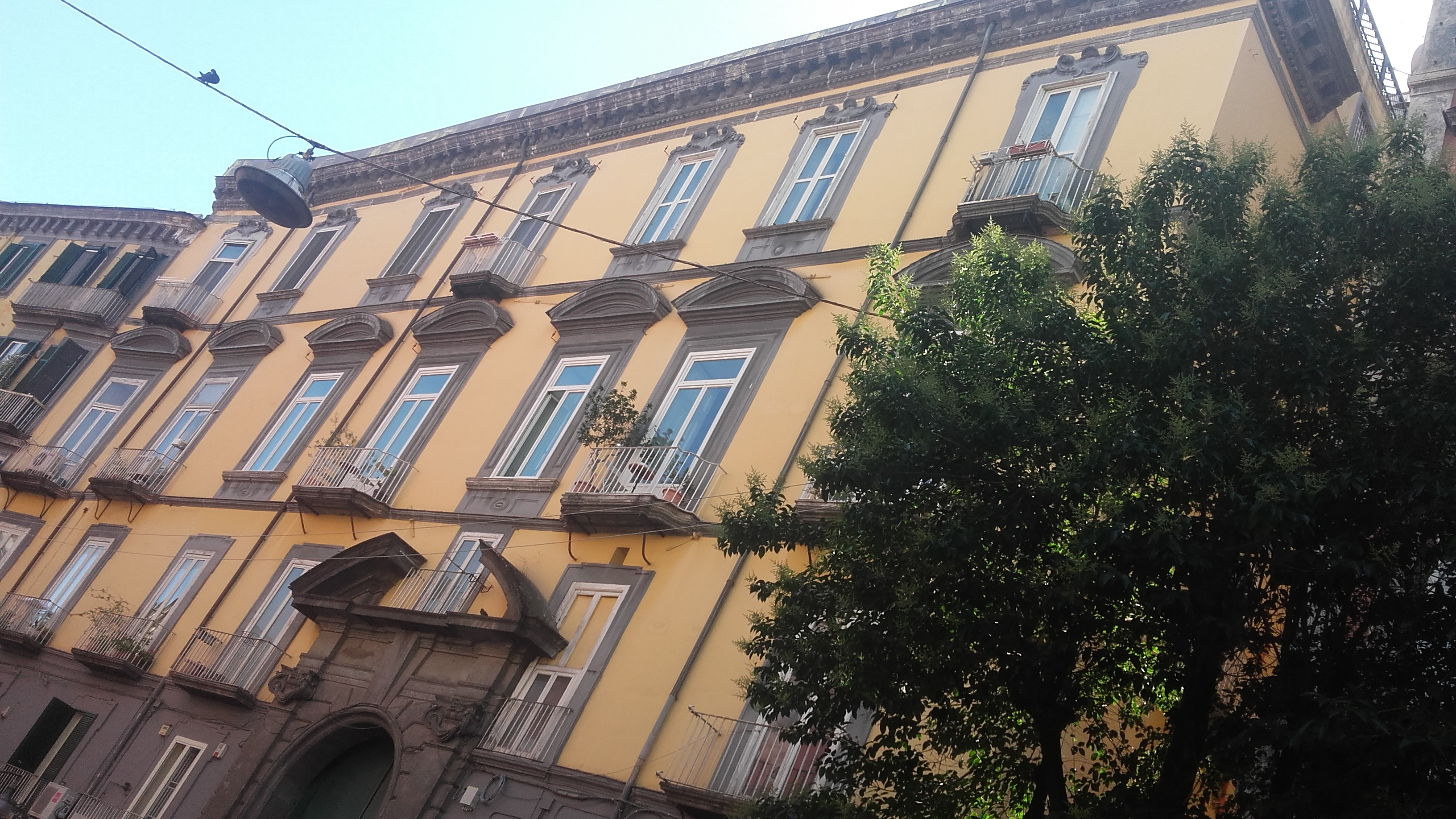 Palazzo del '600 in via Costantinopoli con imponente portale d'accesso.